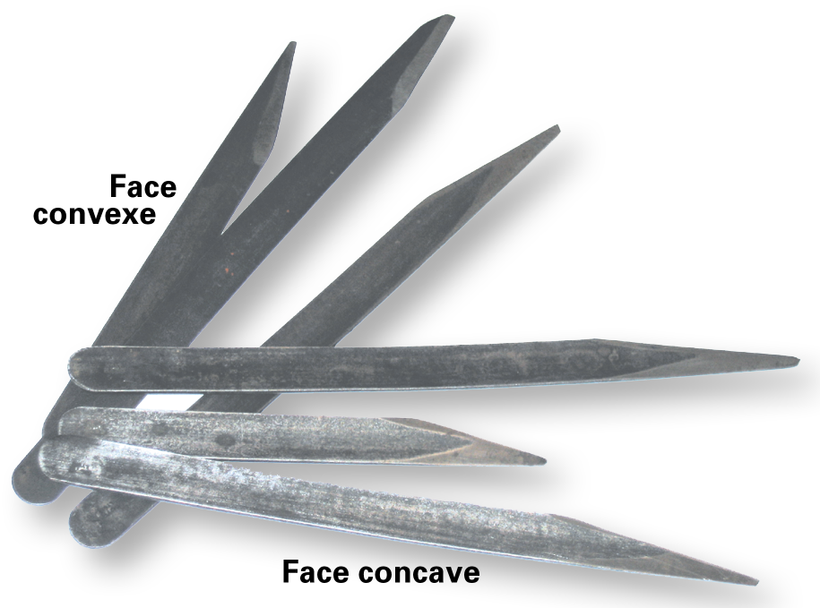 Tranchet servant à couper le cuir source : familiale / photo : Dominique grassigli